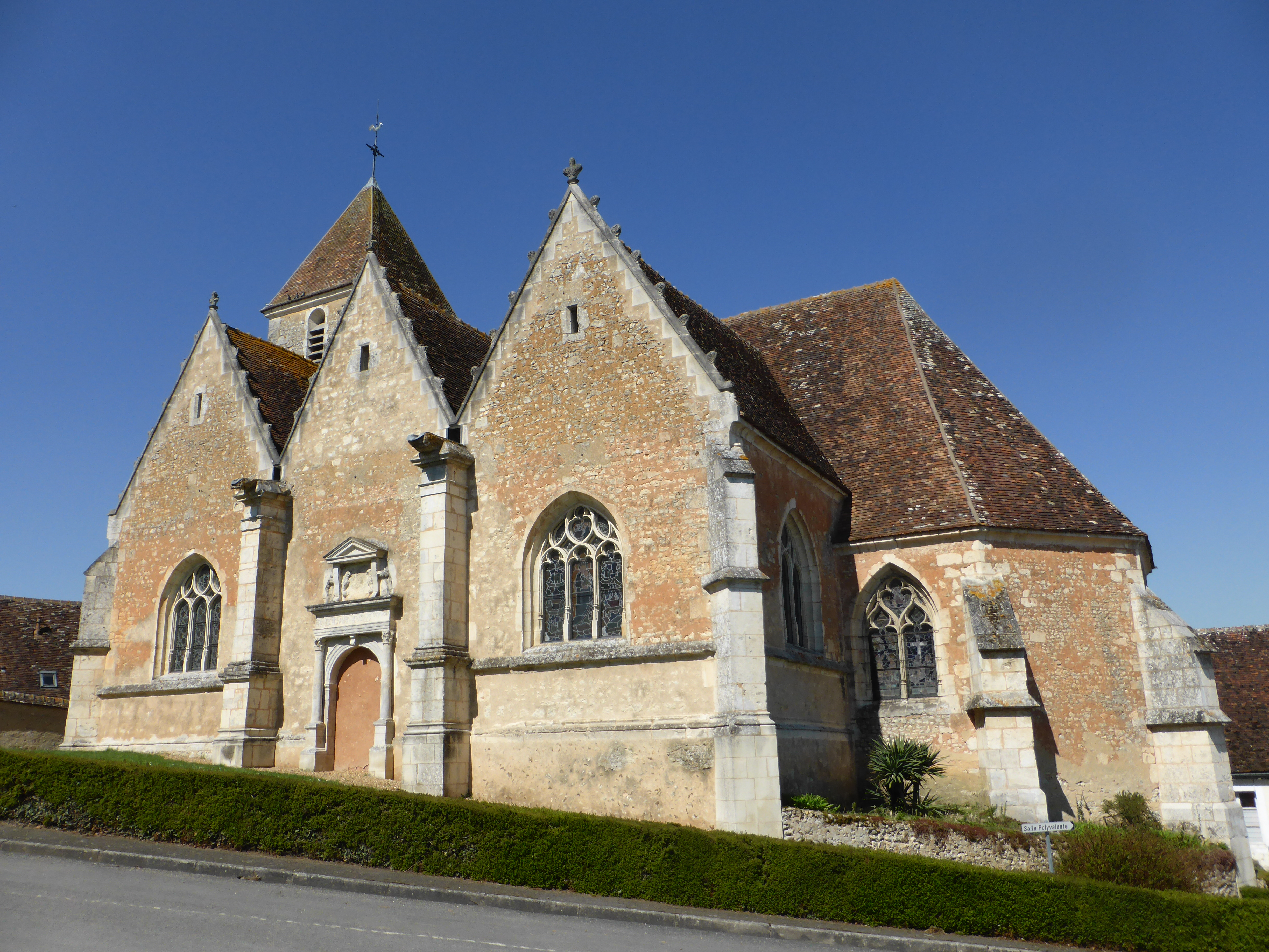 Église de Vichères, en Eure-et-Loir.